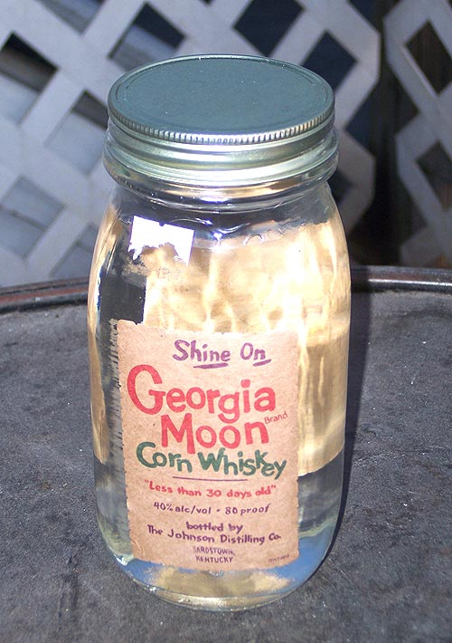 Whisky de maíz Georgia Moon.